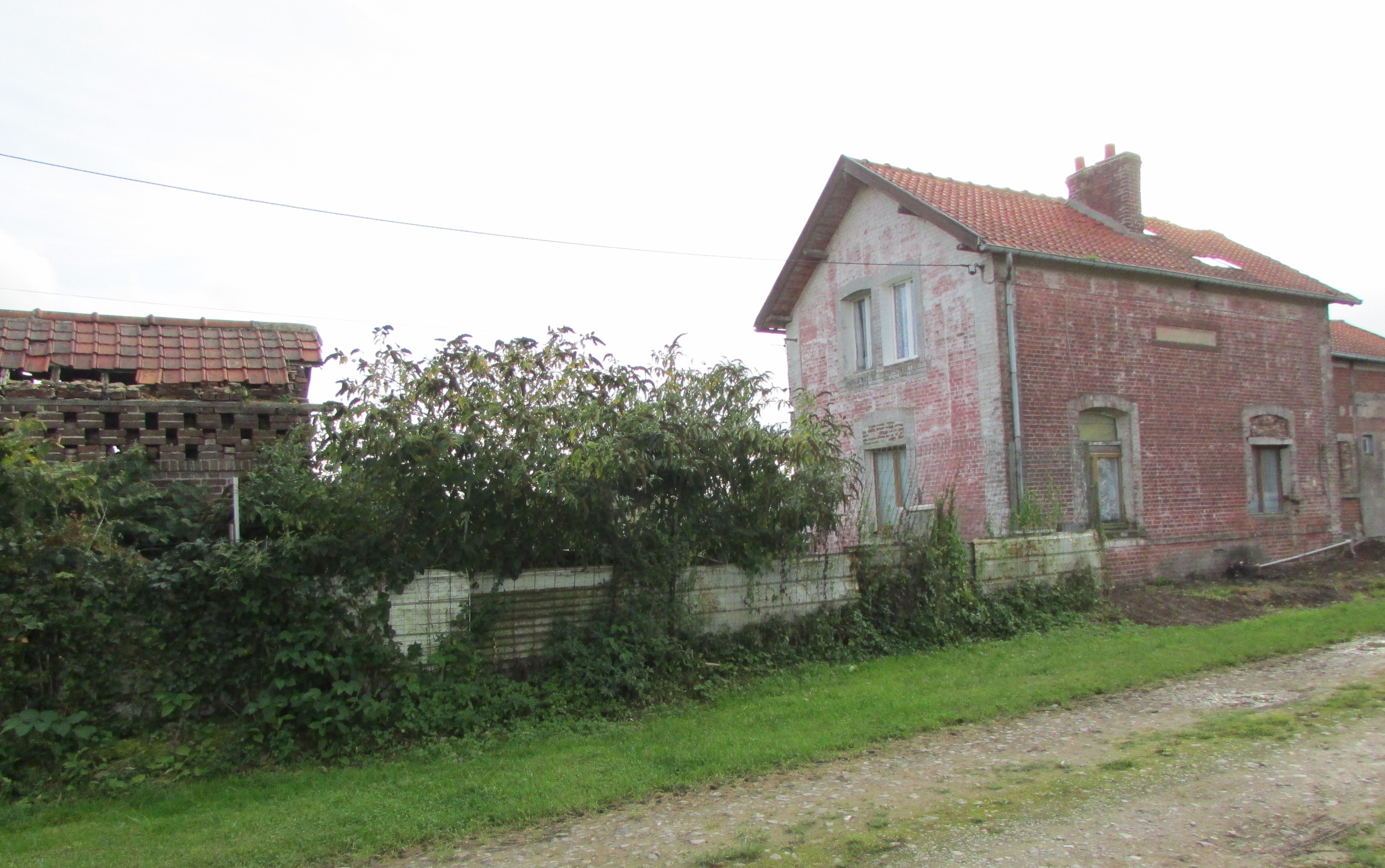 La gare d'Aisonville-et-Bernoville en 2017.